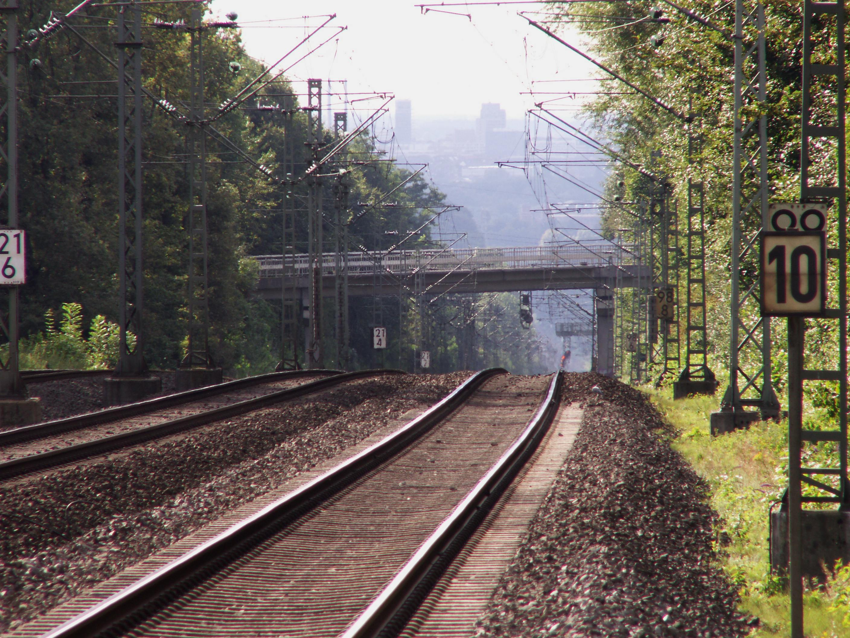 Steilrampe Erkrath-Hochdahl von Hochdahl (Osten) aus gesehen